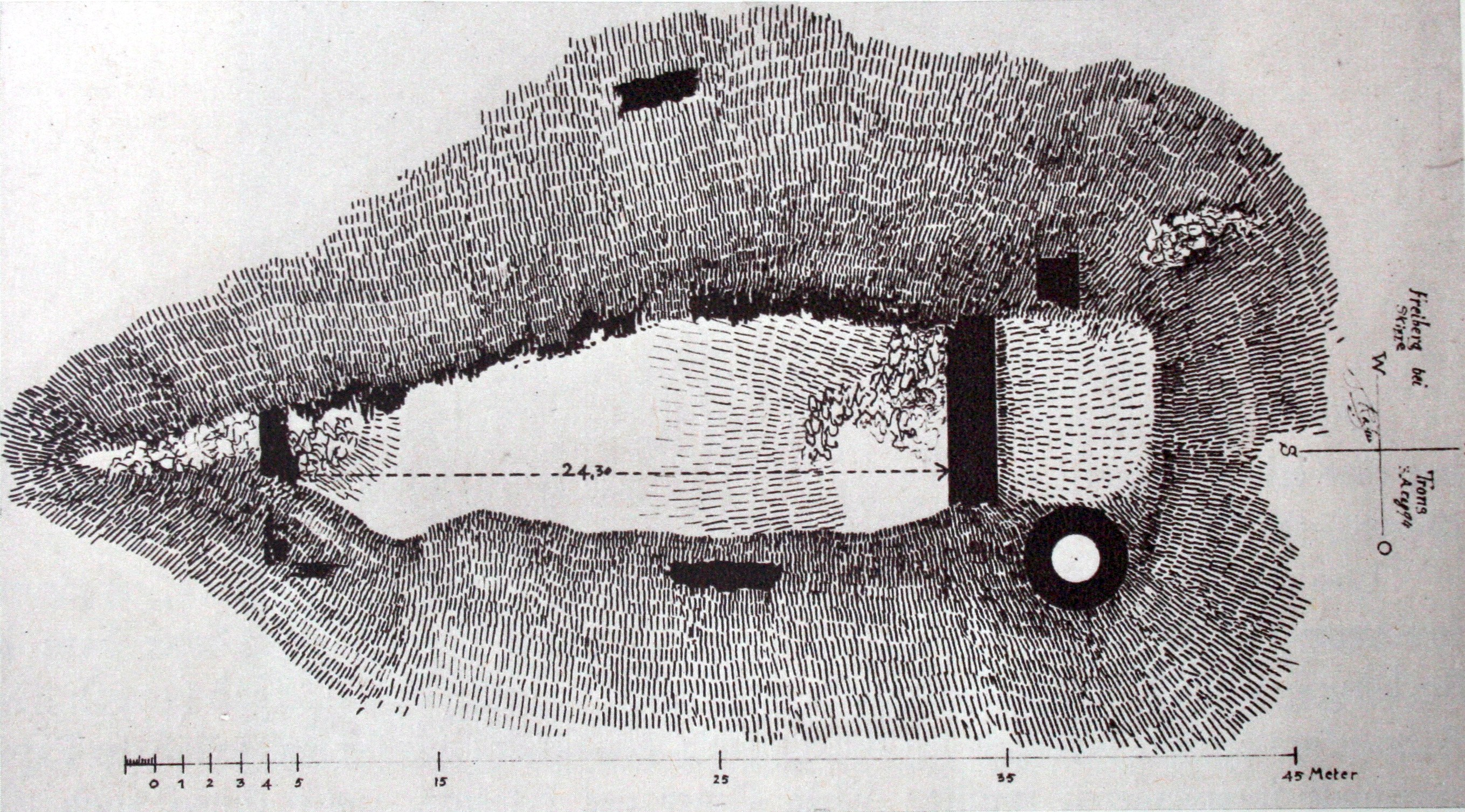 Plan der Burg Friberg, Zeichnung von Rahn um 1894